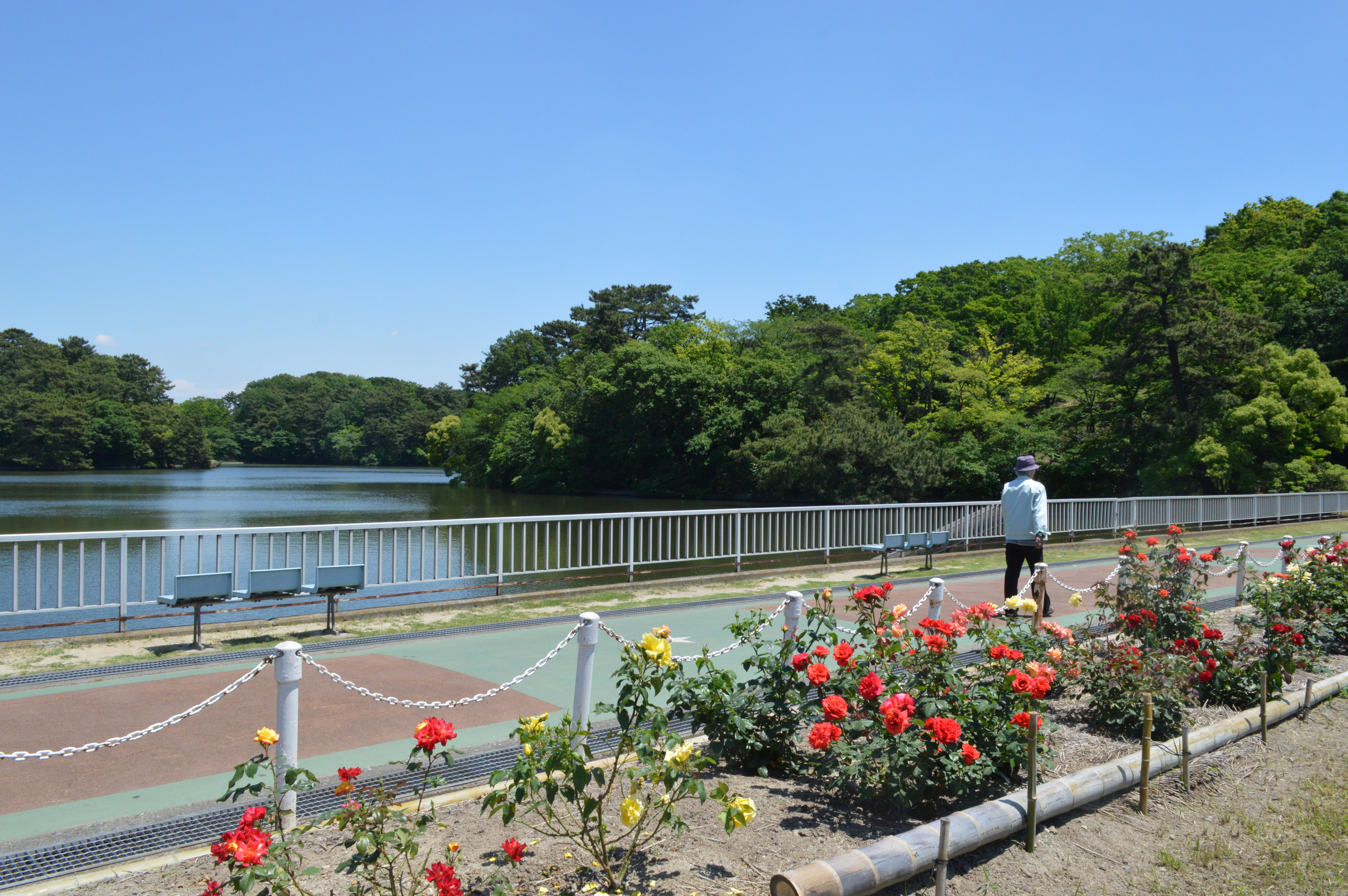 愛知県東海市の大池公園。バラ園。